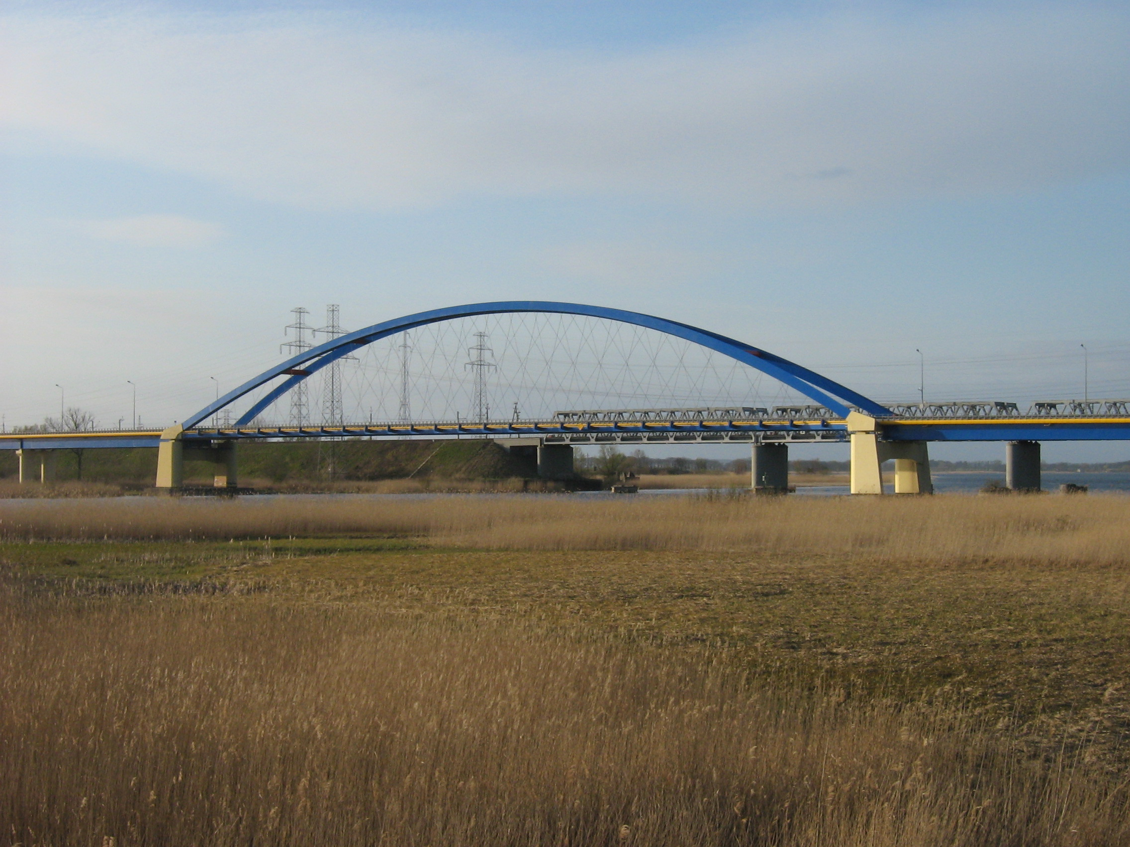 Most na obwodnicy Wolina w ciągu drogi krajowej nr 3